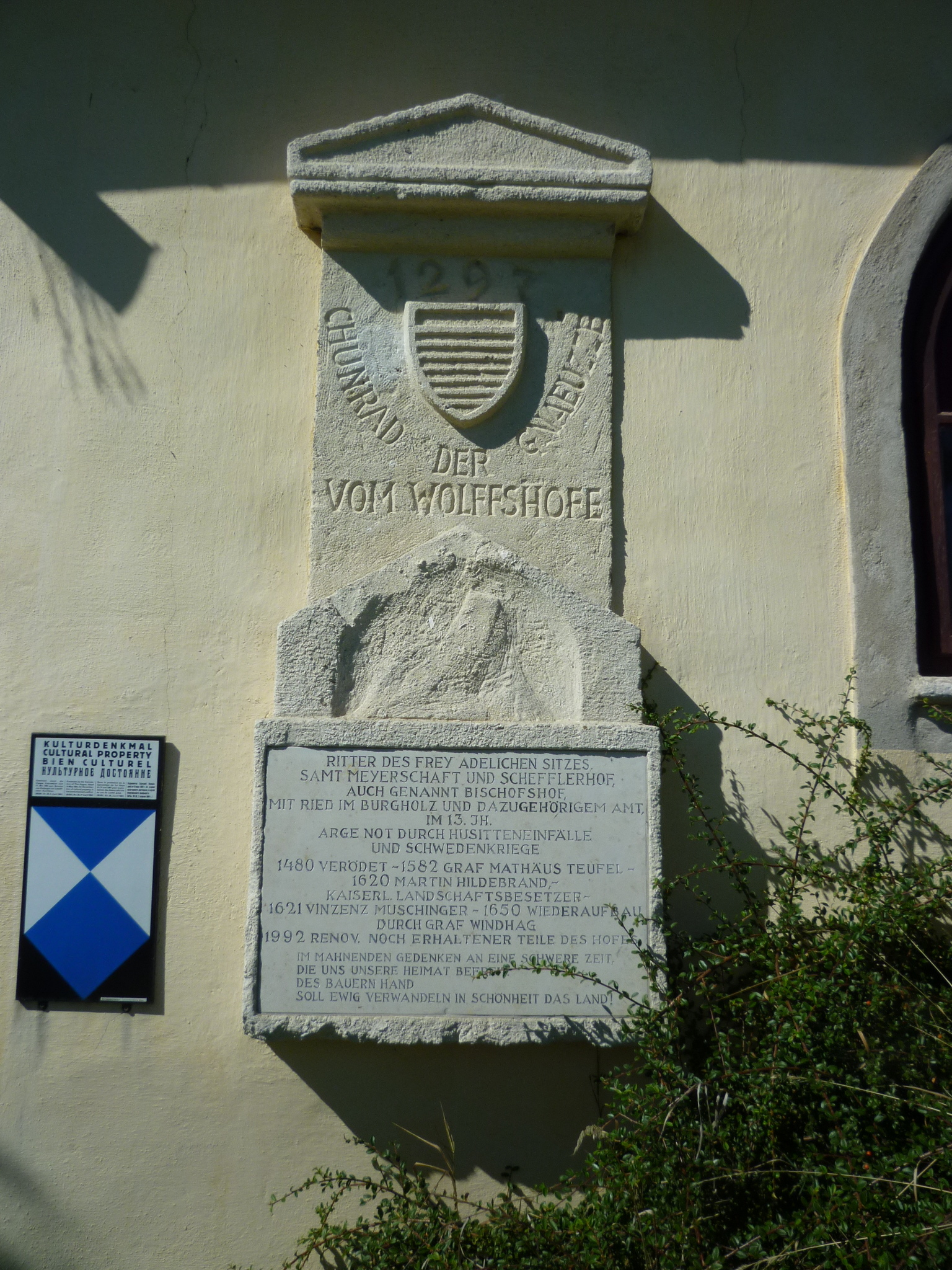 Inschriftentafel am Edelsitz Wolfshof, Gars am Kamp, Niederösterreich